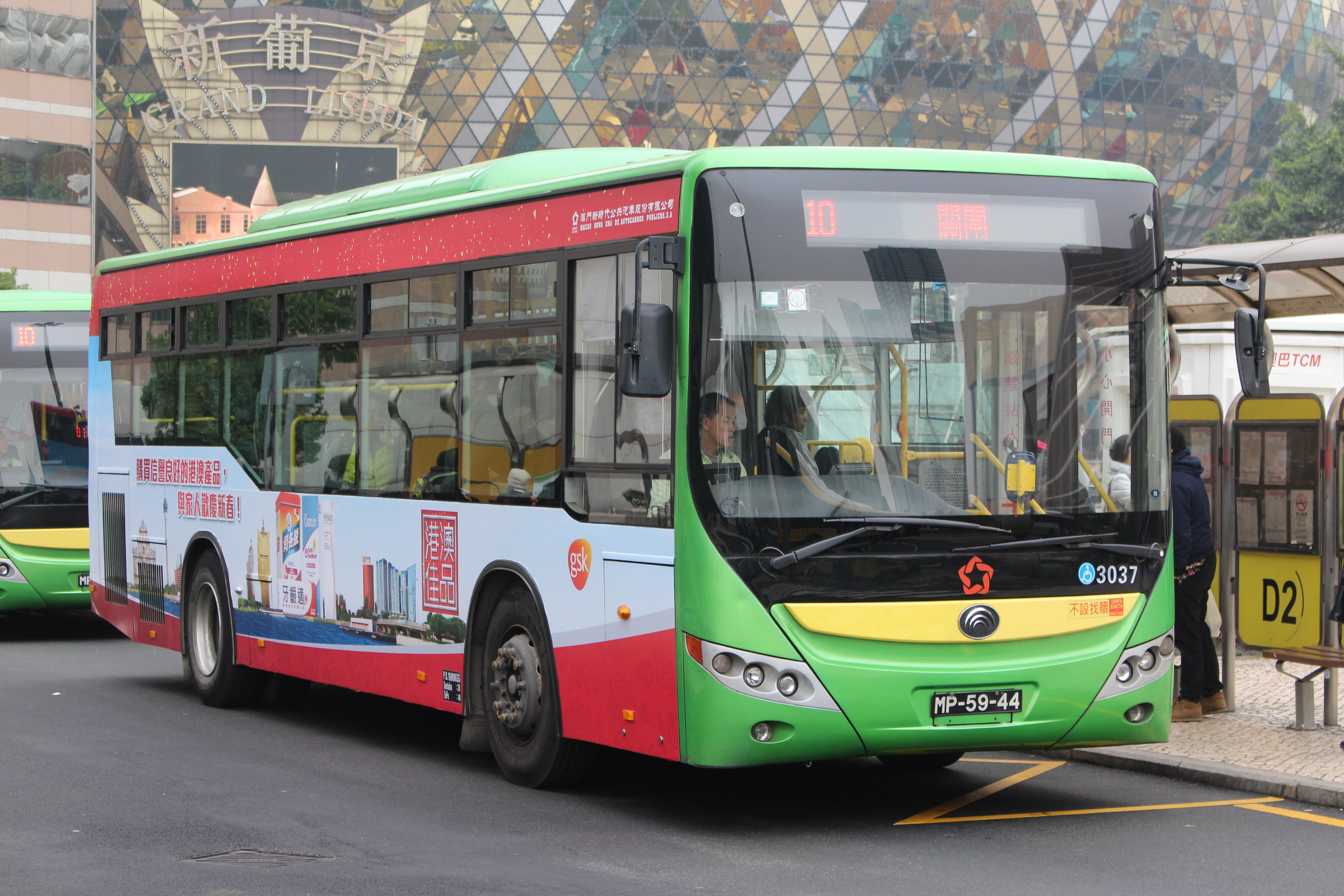 新時代字通大巴行駛10路線.